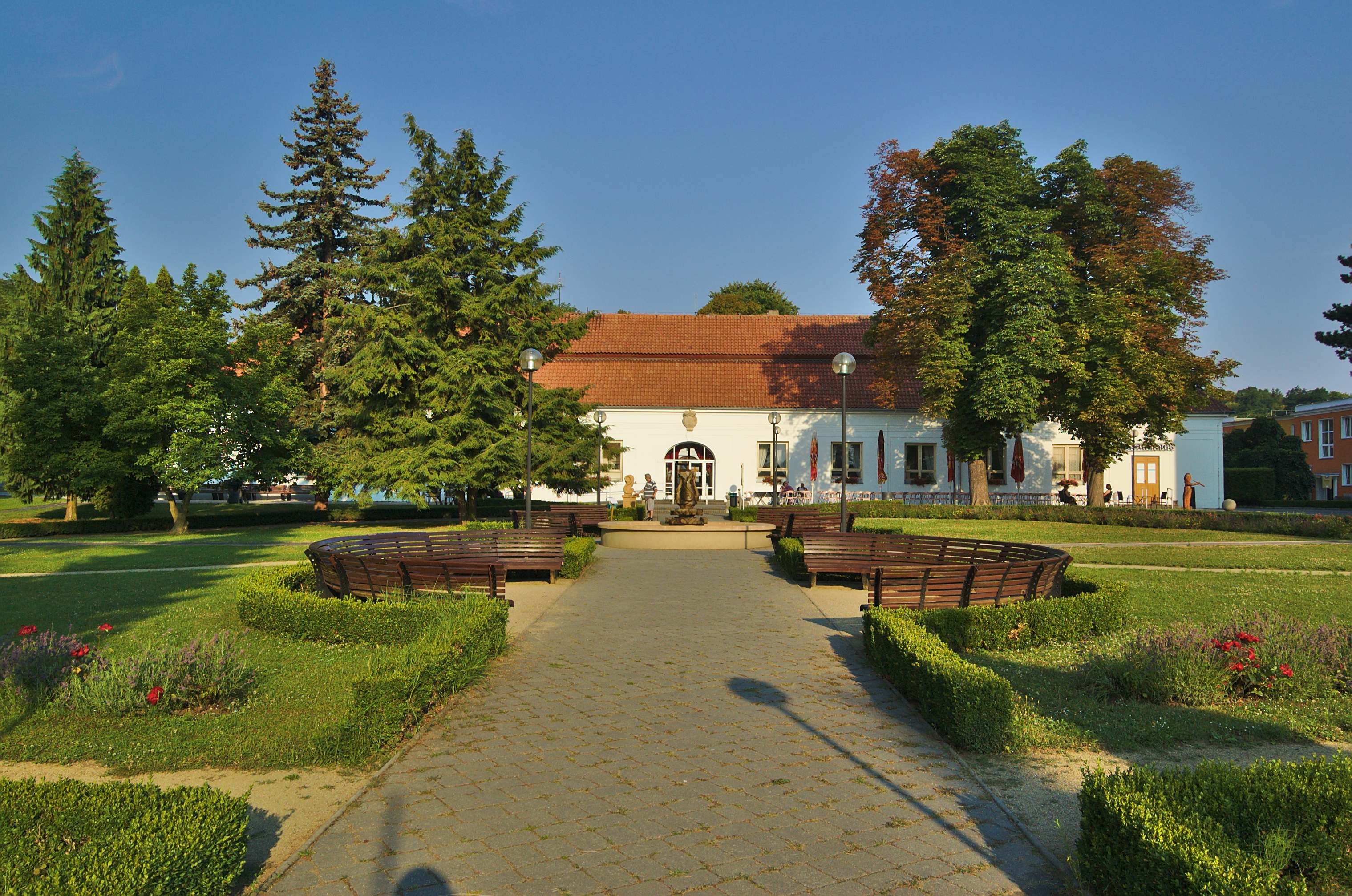 Lázeňský dům Morava, Slatinice, okres Olomouc